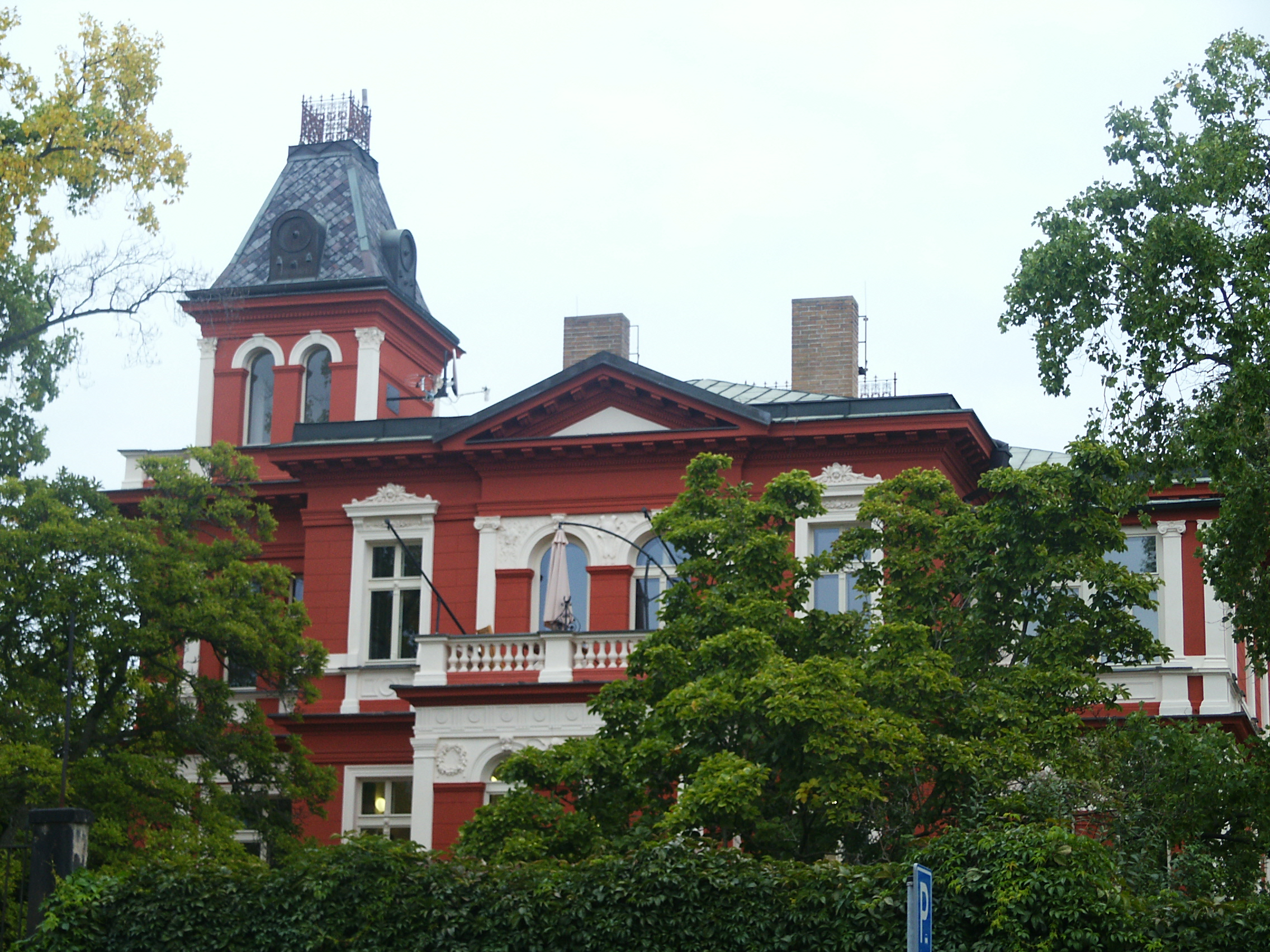 Vila Tereza, Praha 3, Italská, Vozová 438/36, Žižkov